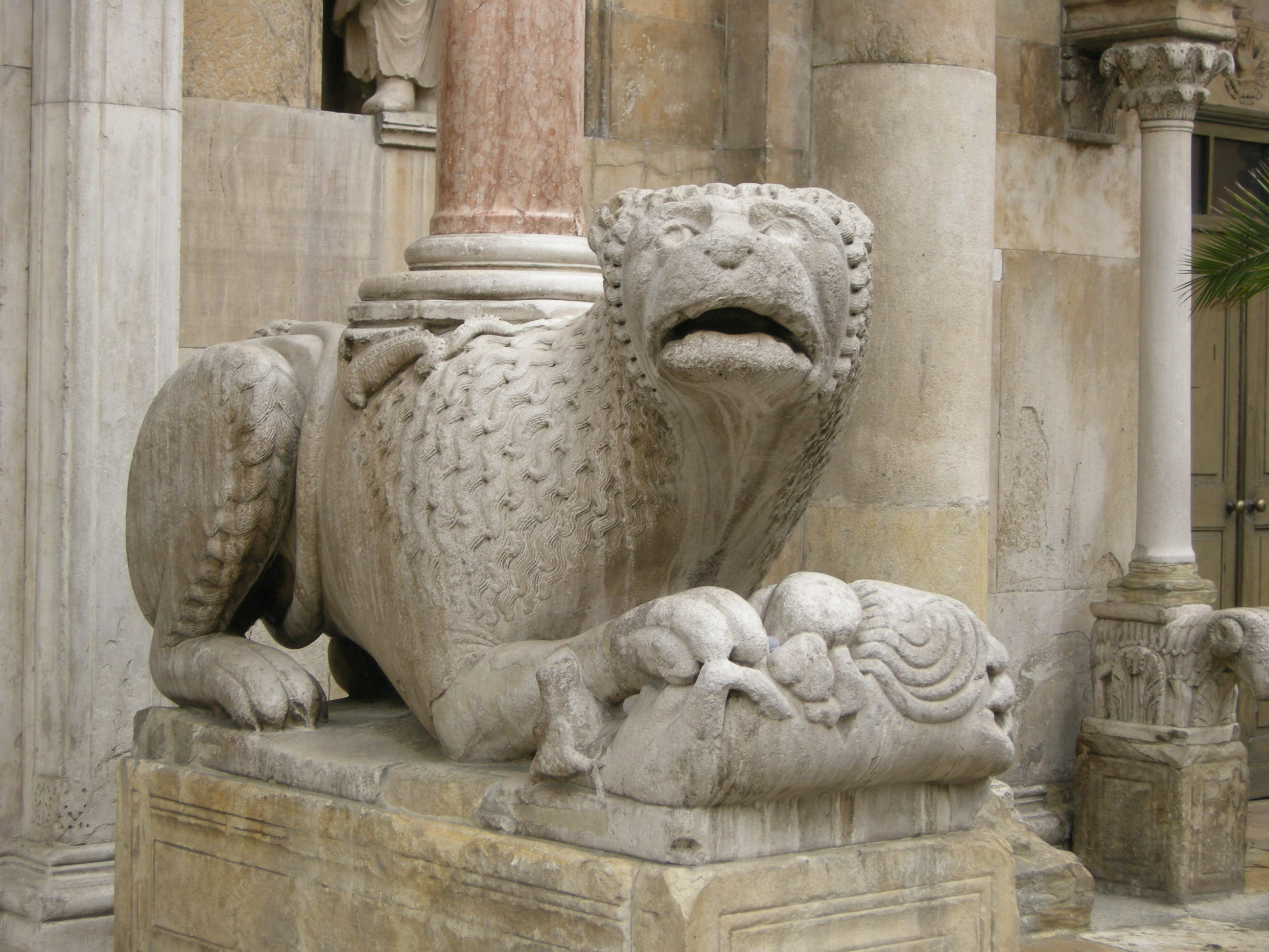 Duomo di fidenza, leone stiloforo dx